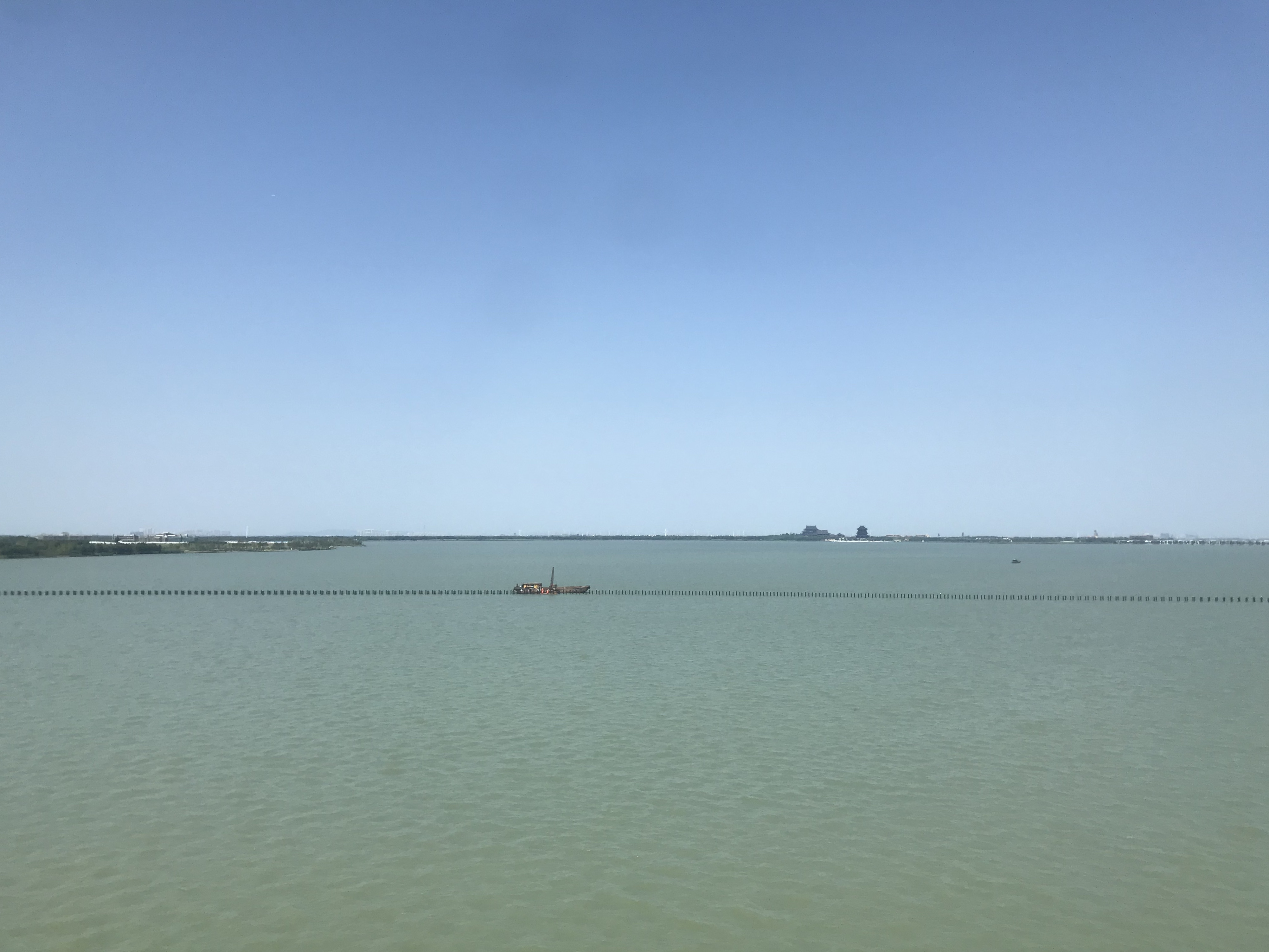 滬寧都市間鉄道の列車内より望む陽澄中湖